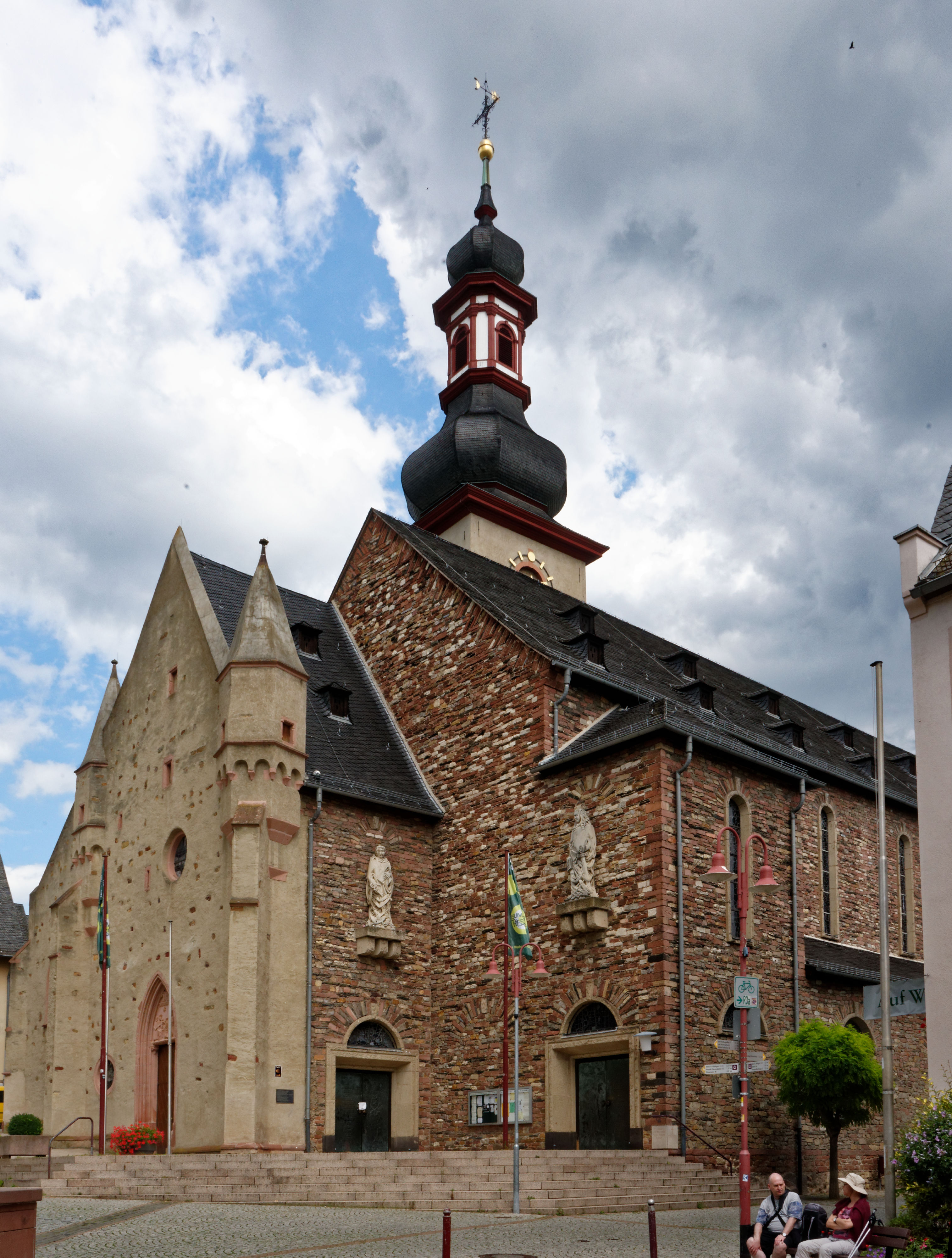 St. Jakobus Rüdesheim Außenansicht